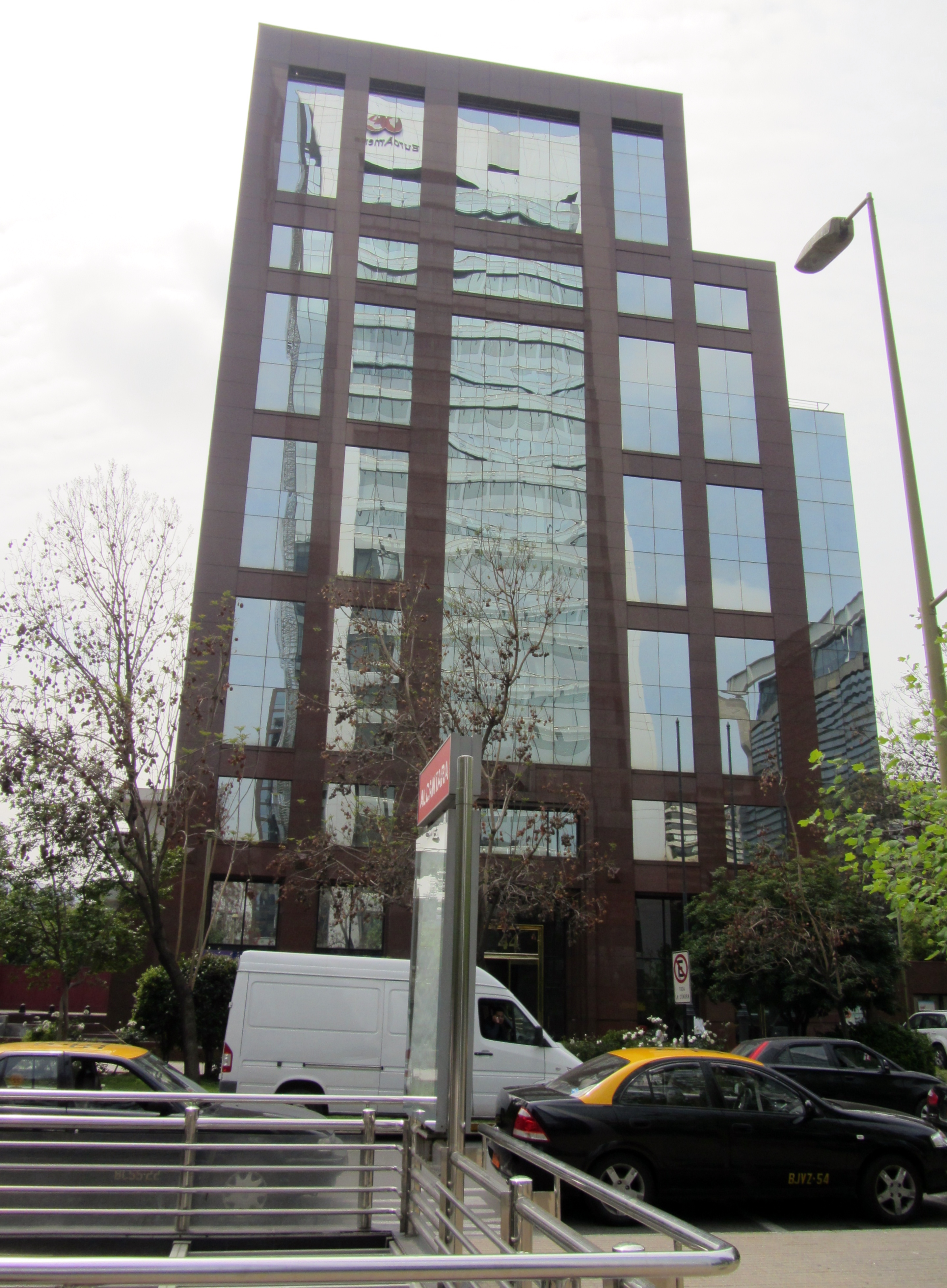 Avenida Alcántara esquina Apoquindo. Se ve la boca de la estación de metro del mismo nombre y al frente, en la acera oriente, un moderno edificio.